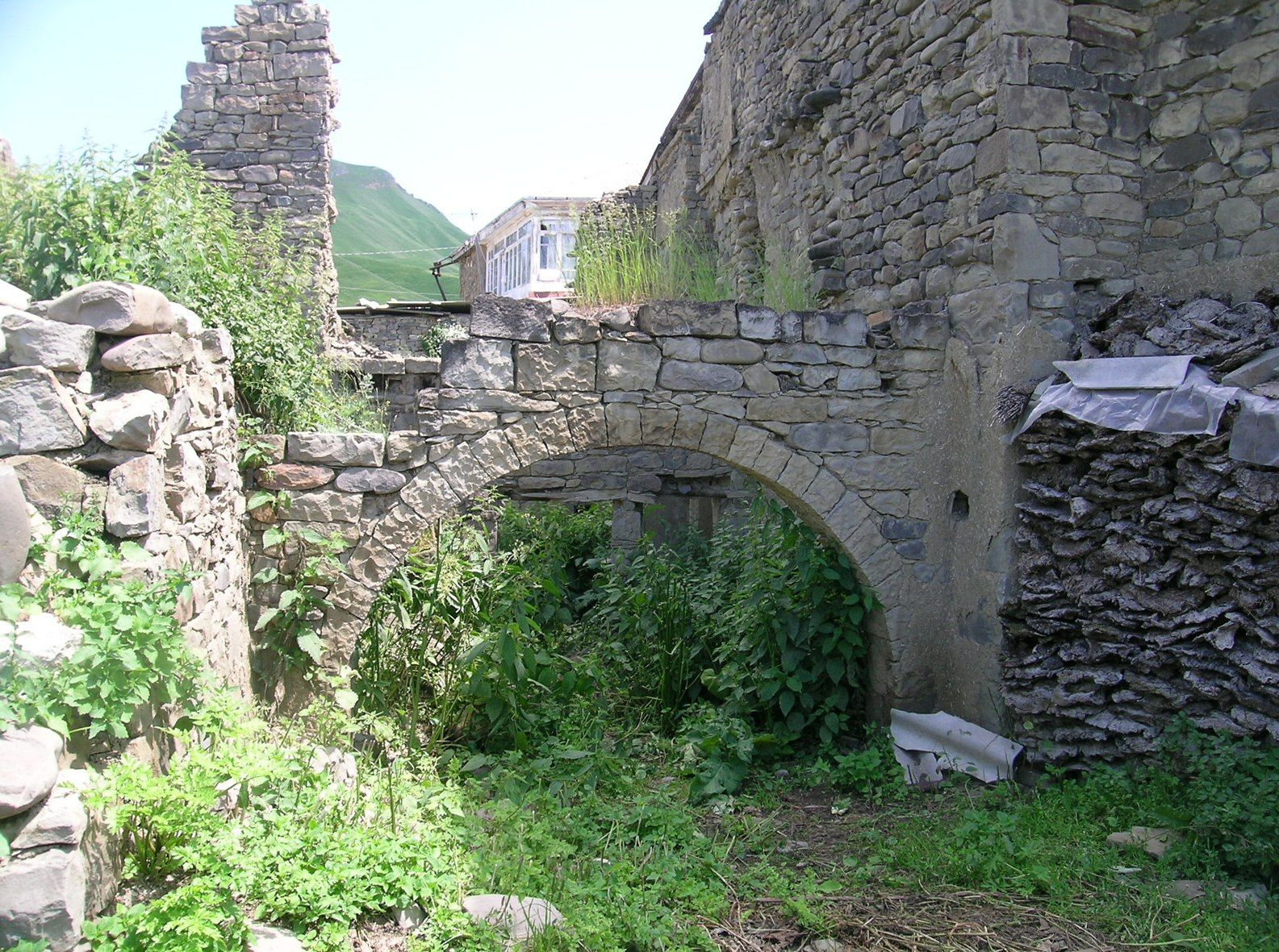 Лакский район, с. Хури